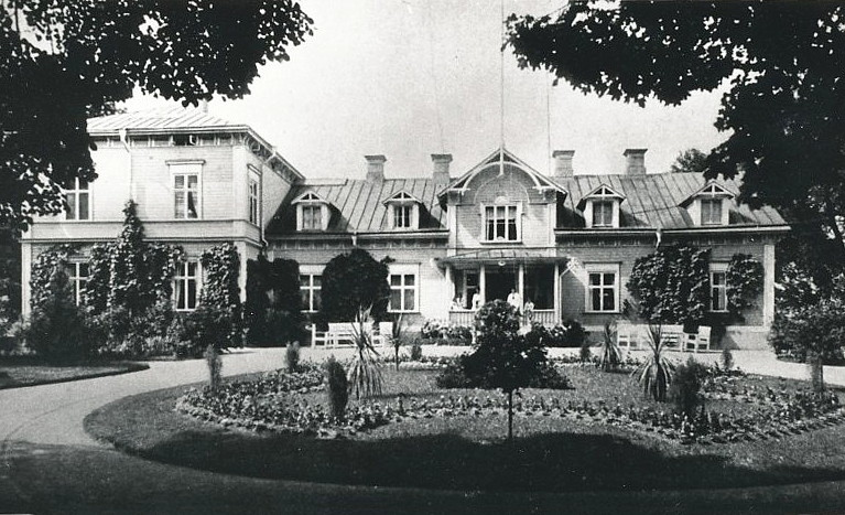 Abottnäs gård